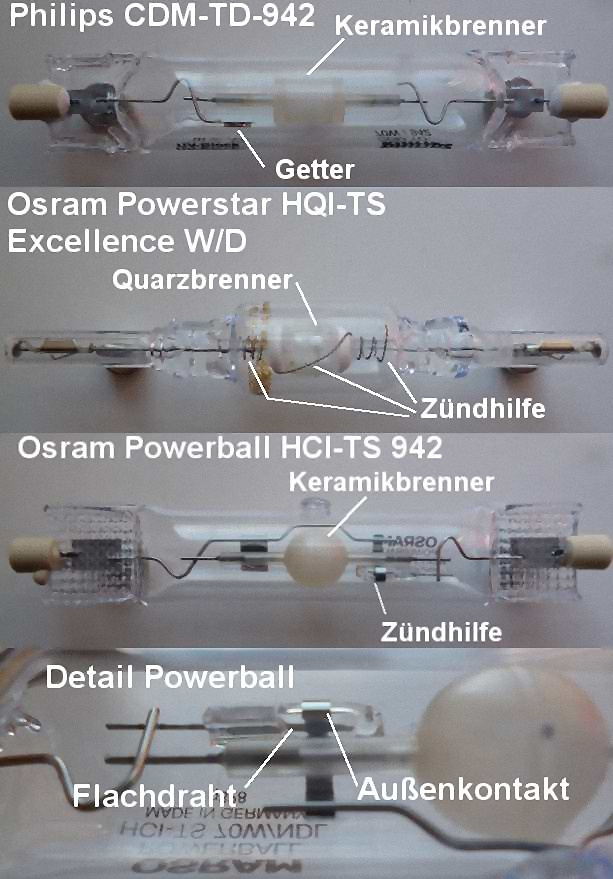 Vergleich der Brennerausführung von Halogenmetalldampflampen: Quarzentladungsgefäß, zylinderförmiges Keramikentladungsgefäß, kugelförmiges Entladungsgefäß. Zündhilfe durch UV Licht, welches durch eine Coronaentladung im Außengefäß oder einem Hilfsgefäß erzeugt wird.